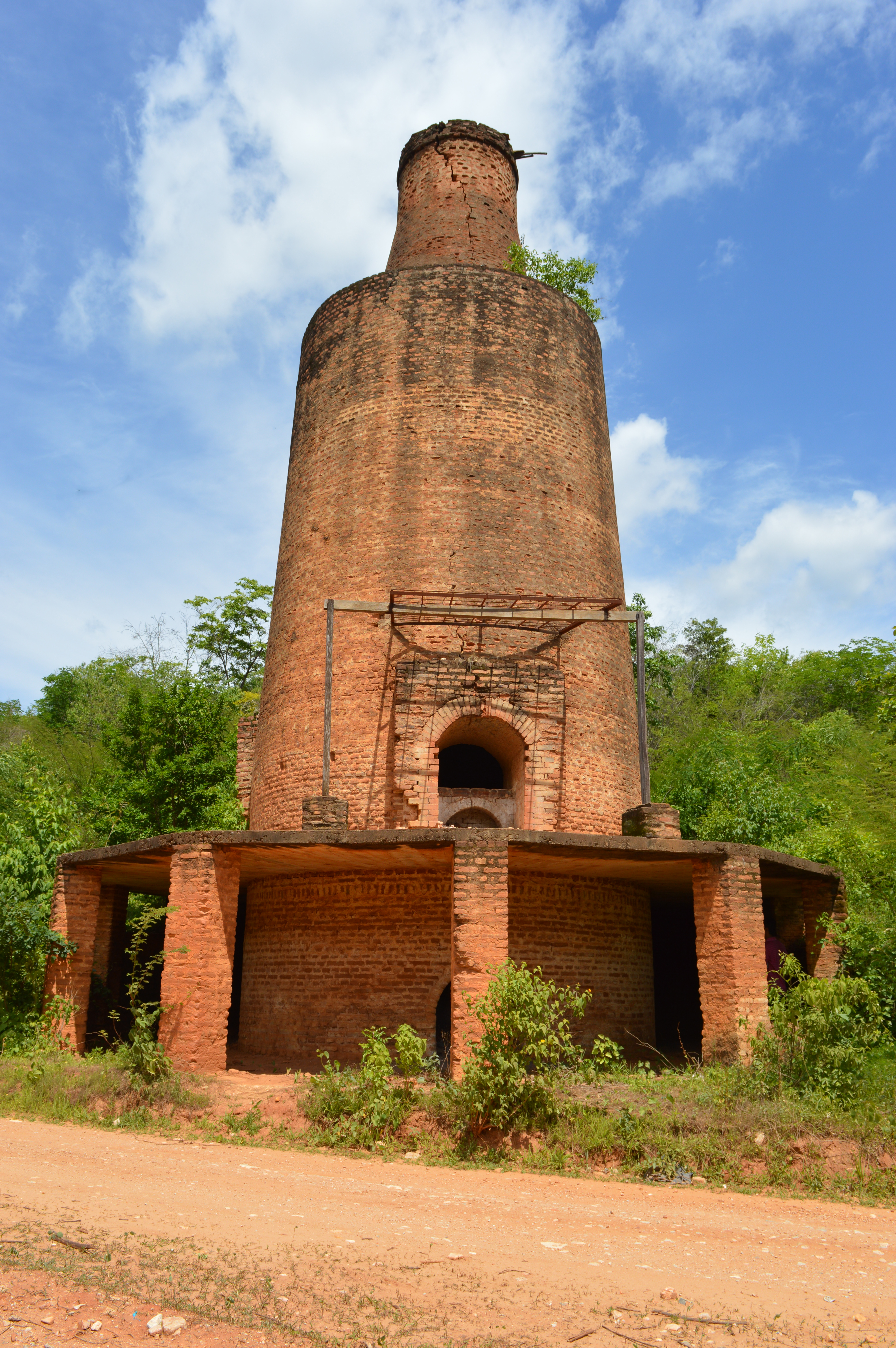 Forno da Cal